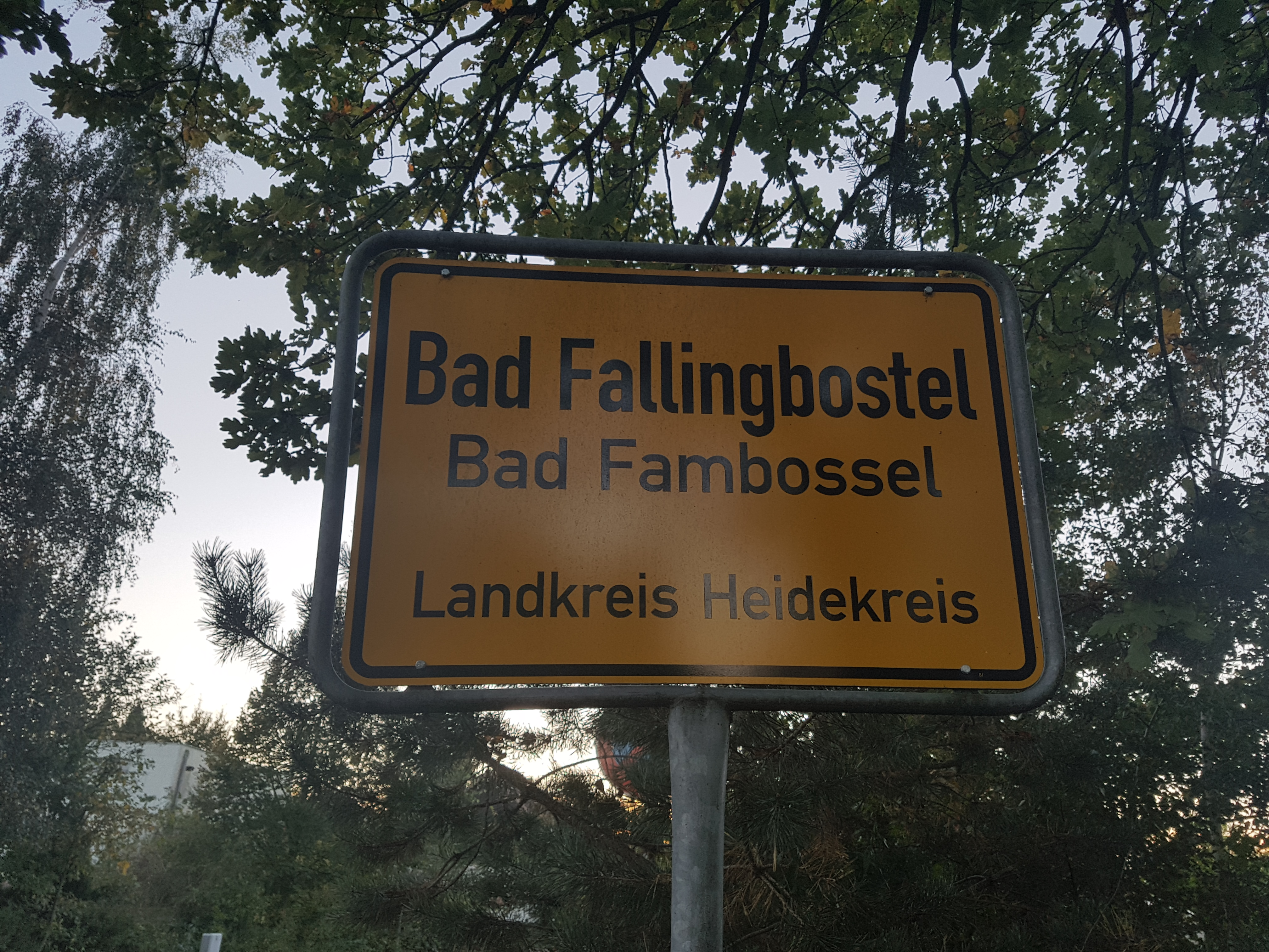 Oortsschild von Fambossel